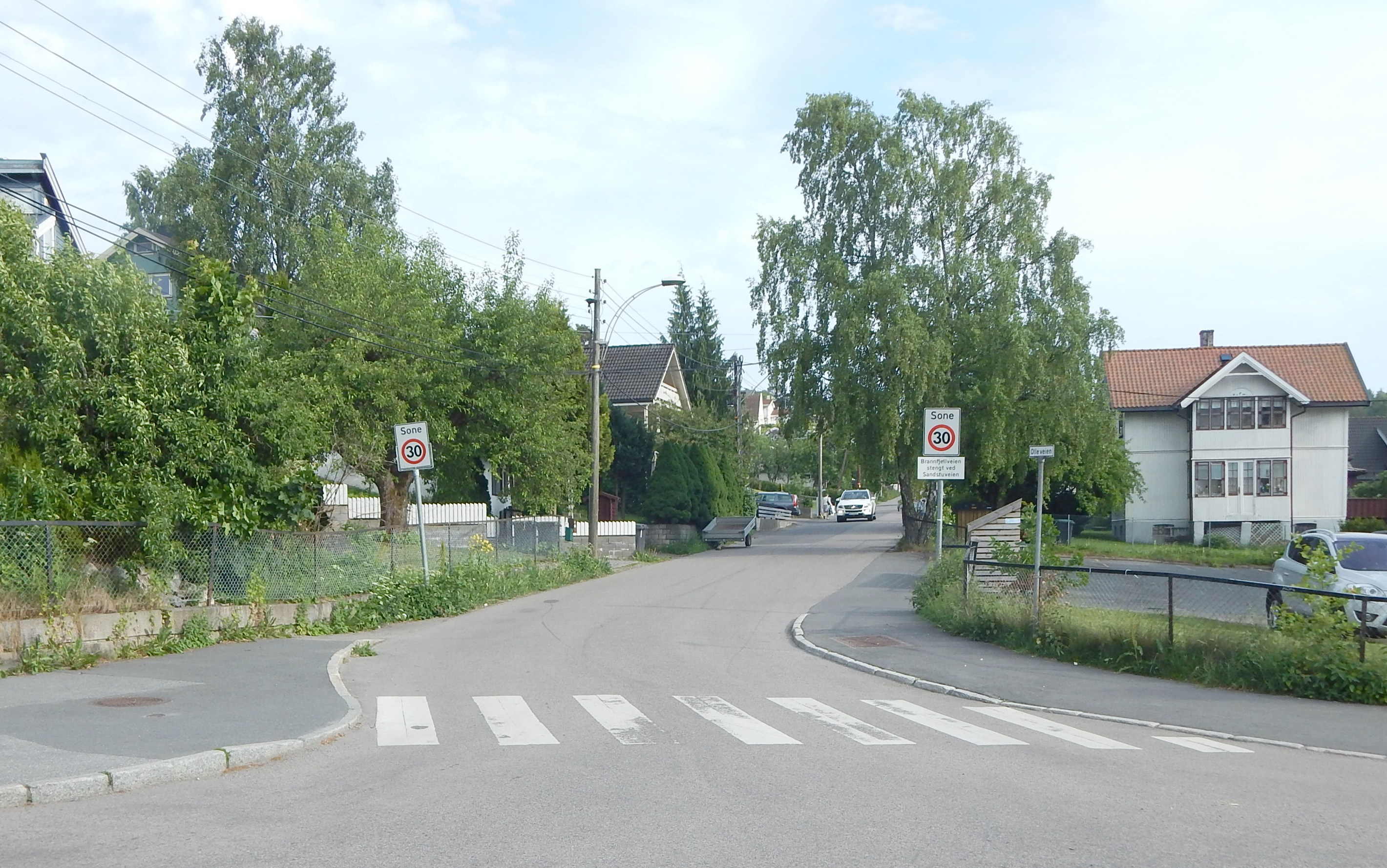 Olleveien sett fra Vårveien